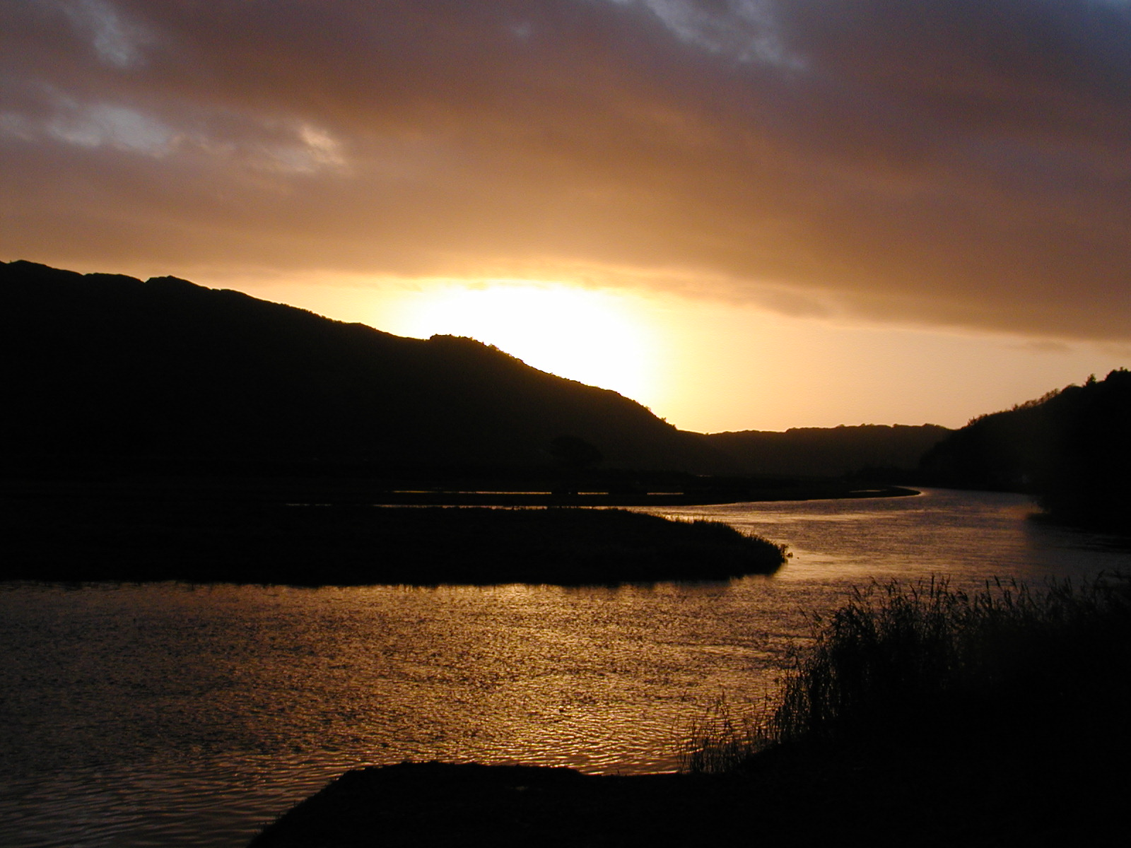 Afon Dwyryd yn ymyl Maentwrog